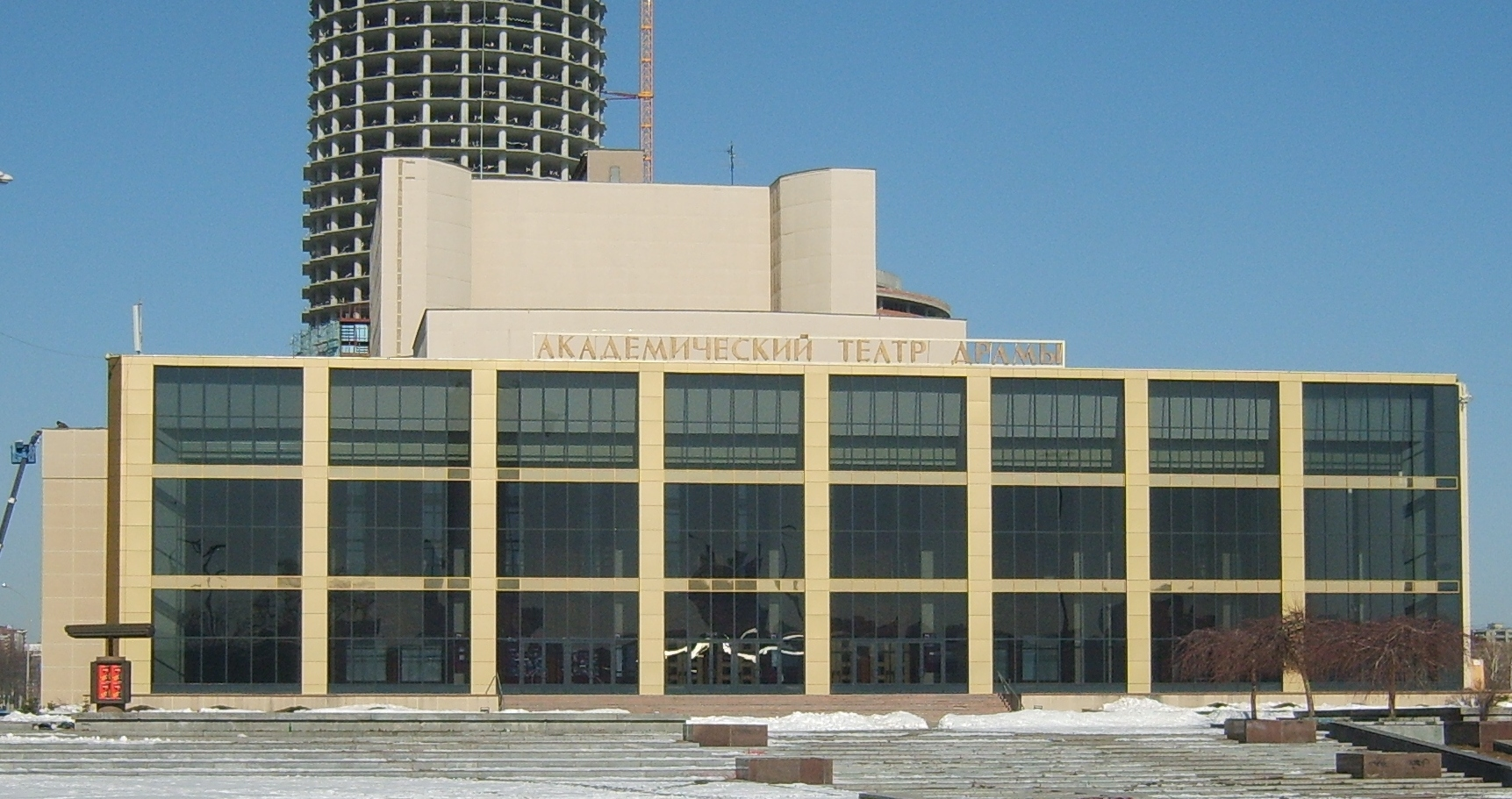 здание Екатеринбургского академического театра драмы